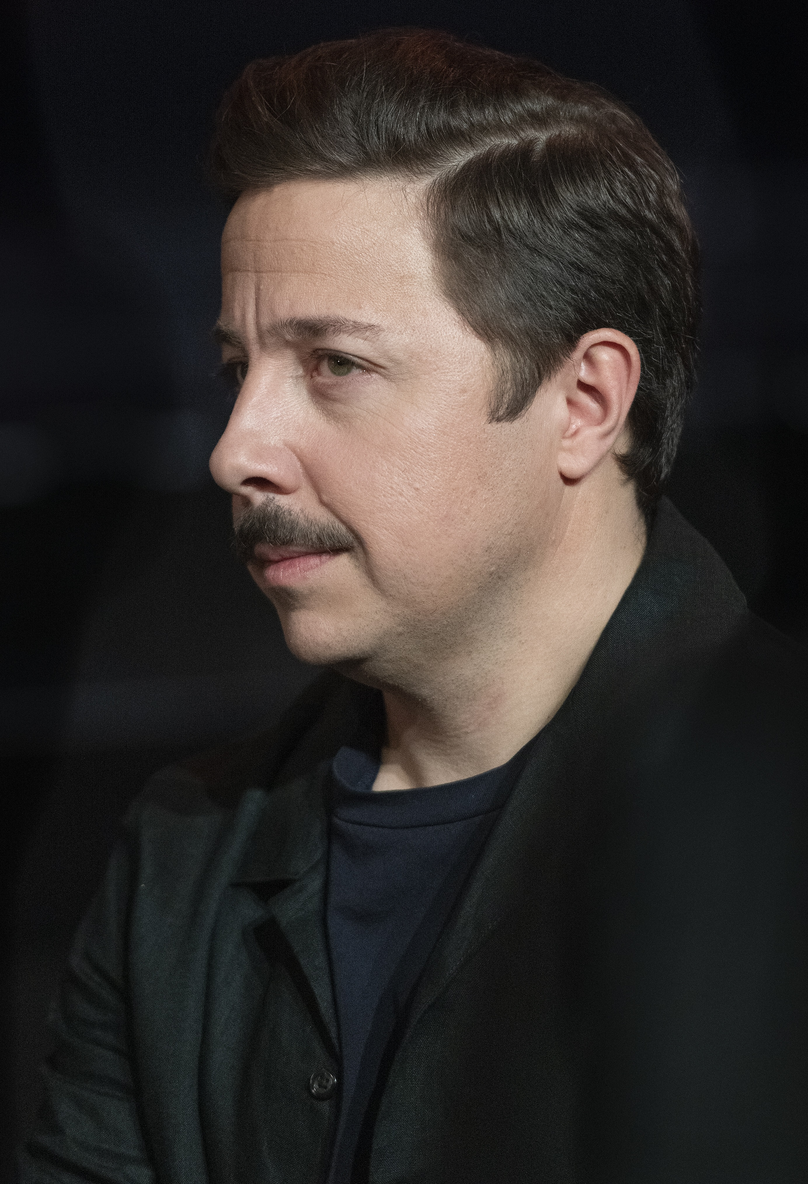 David Sundin programledare Melodifestivalen 2020 Linköping